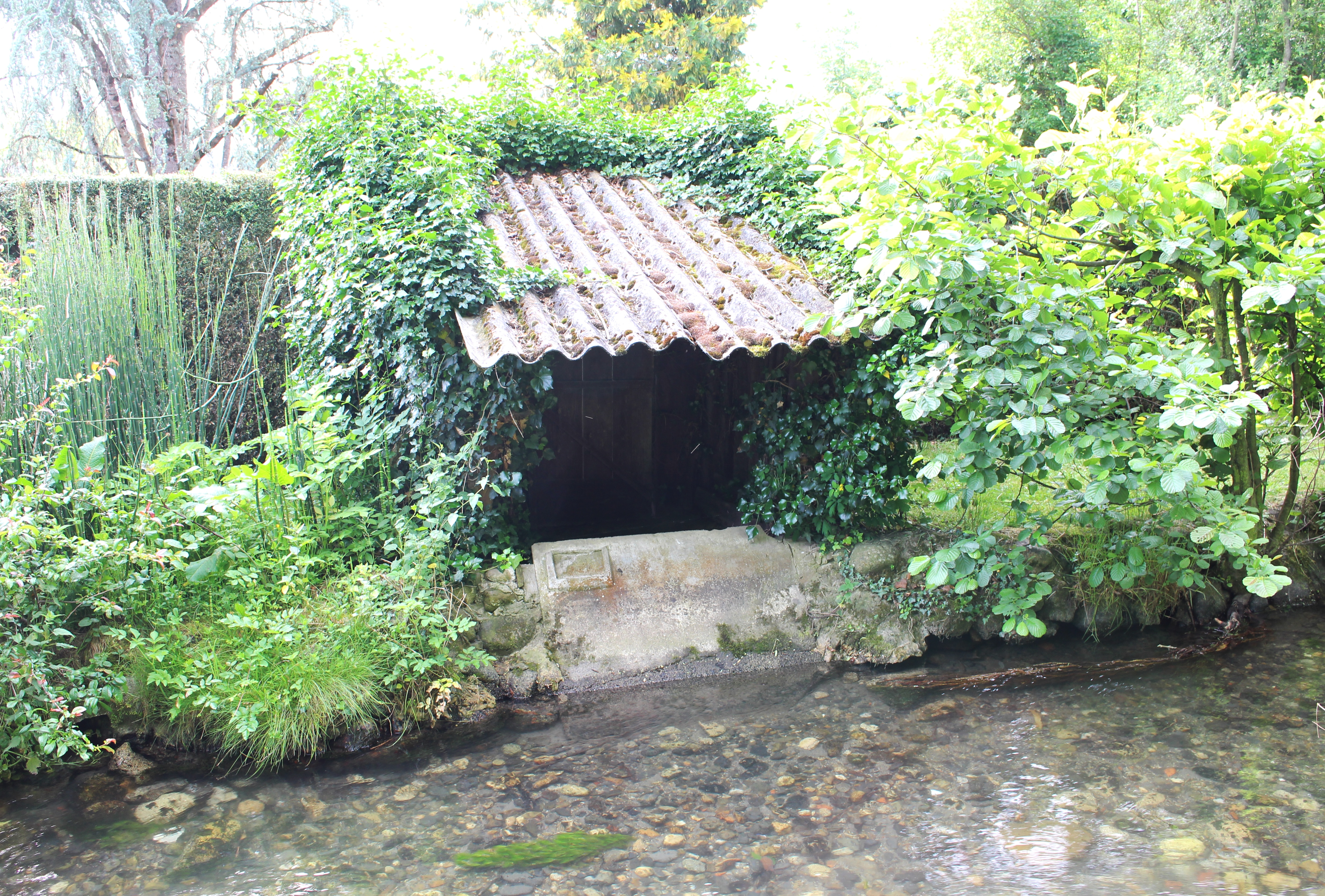 Lavoir de Salles-Adour (Hautes-Pyrénées)